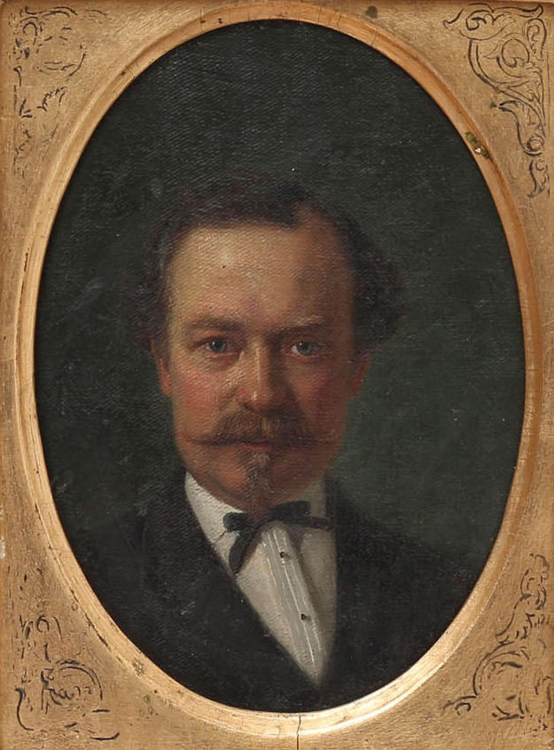 Porträtt av fabrikören och konstnären Frans Gustaf Klint (1836-1902). Målning av Jakob Kulle 1838-1898 från ca 1880. Oljemålning på duk, otydligt signerad i rött ovanför vänster axelparti.